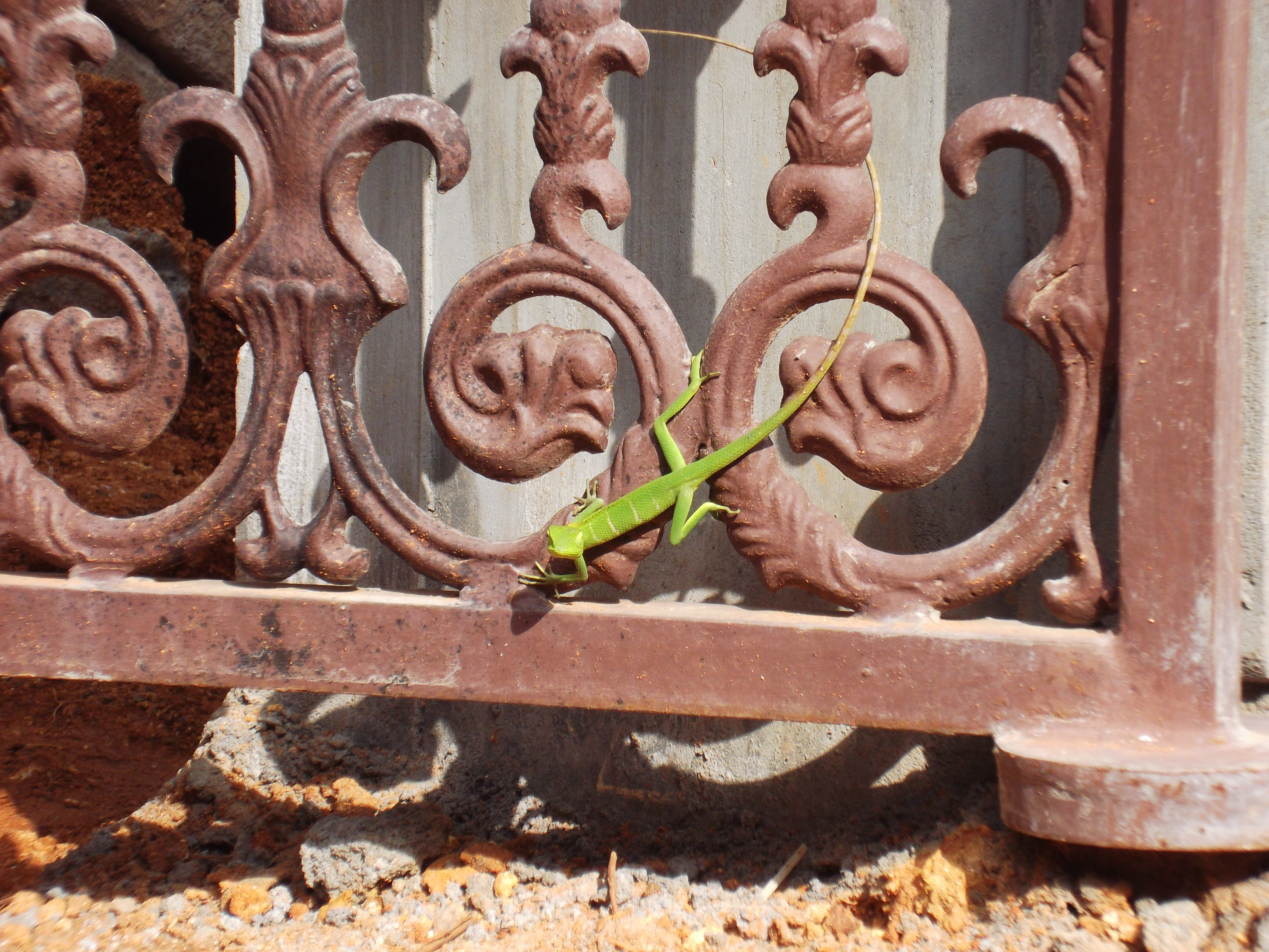 പച്ച നിറം പ്രദര്‍ശിപ്പിച്ച് നില്‍ക്കുന്ന ഒരു ഓന്ത്.